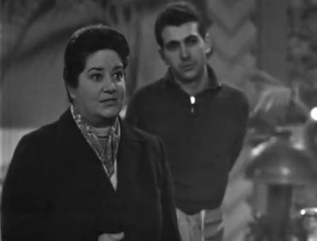 Vittoria Di Silverio nell'episodio La vecchia signora di Bayeux dello sceneggiato televisivo Le inchieste del commissario Maigret (Italy, 1966, M. Landi)